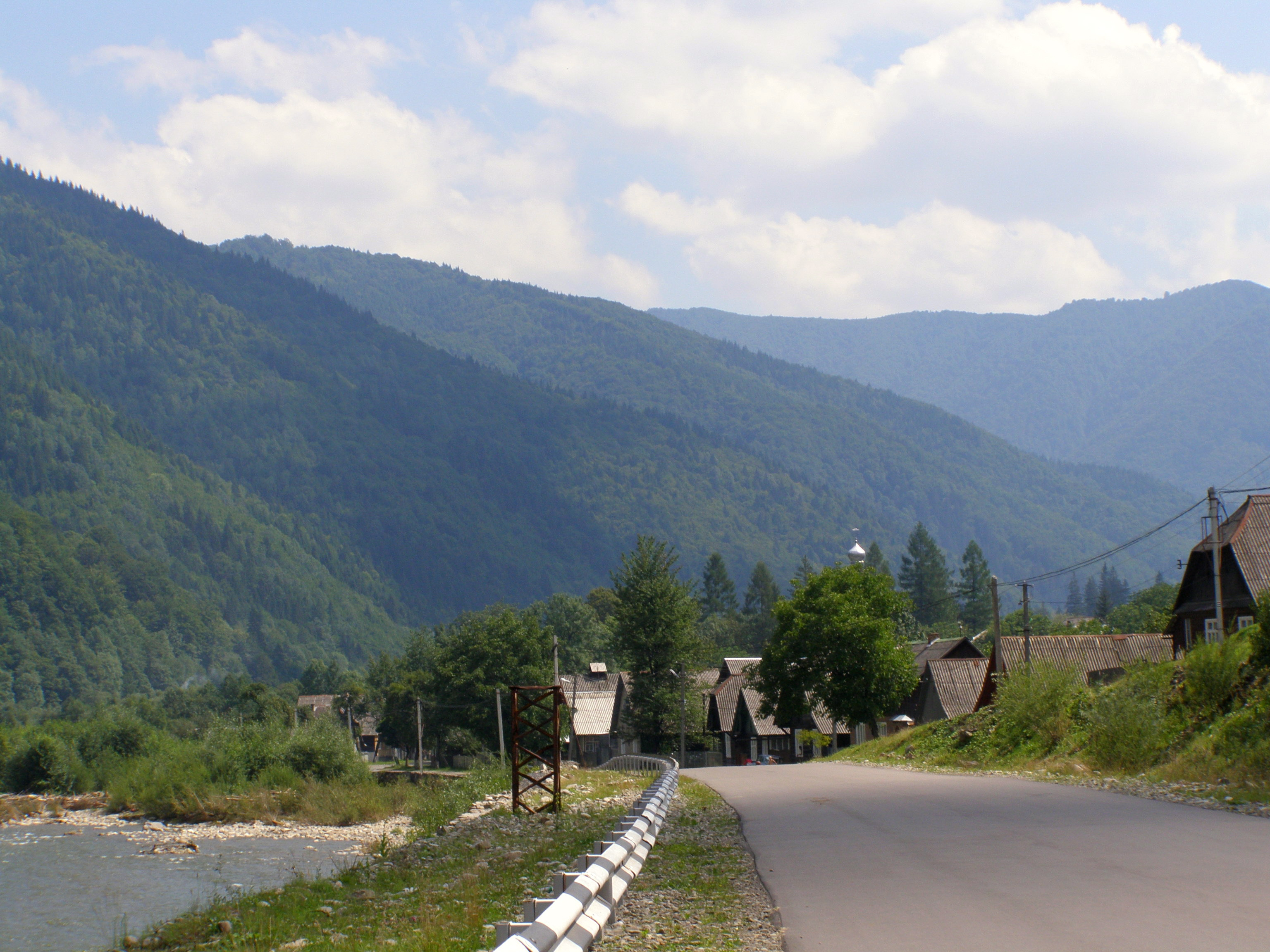 Usť-Čorna, vlevo řeka Teresva, v pozadí hory masivu Svydovec